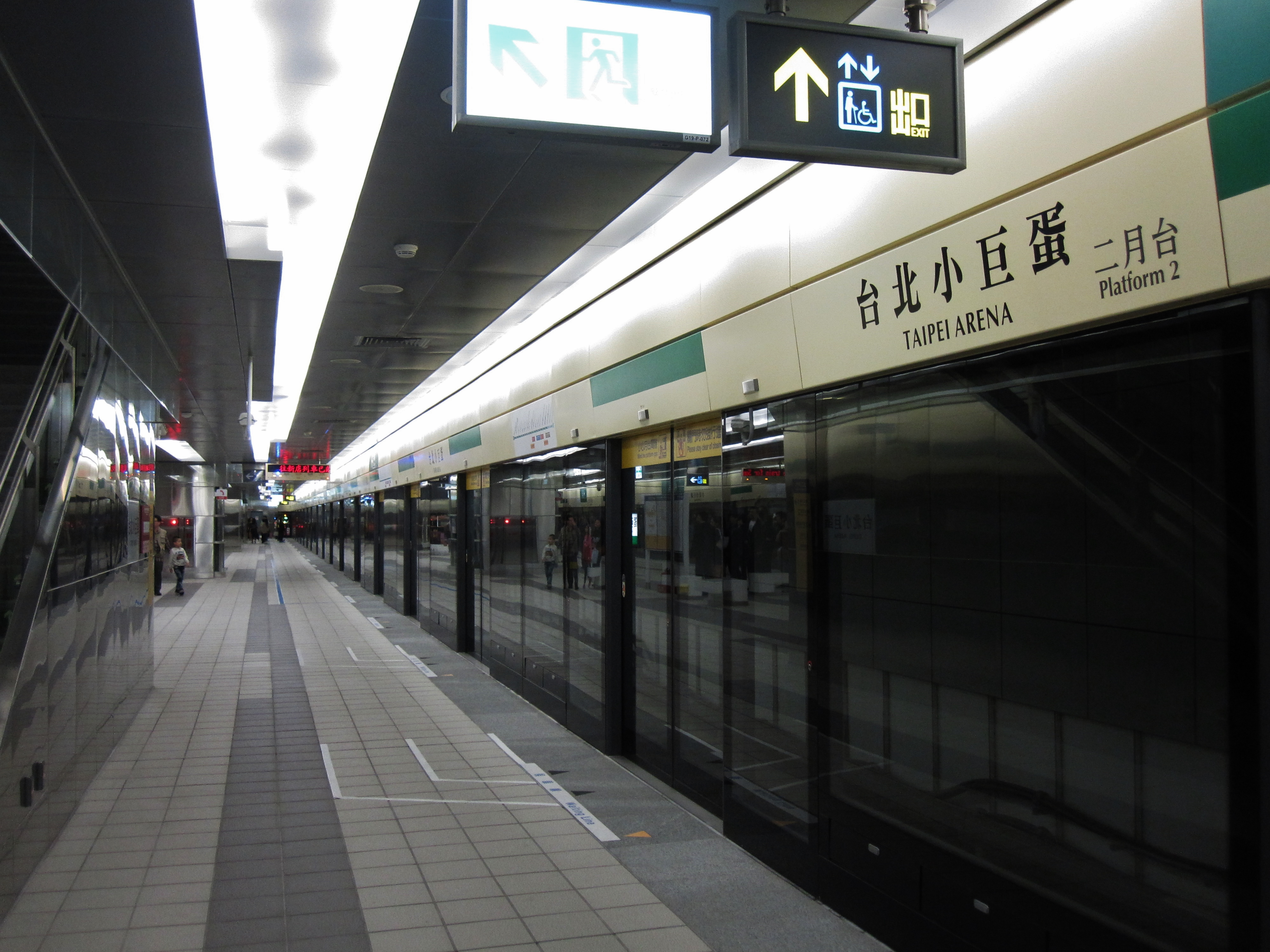 中文（台灣）: 台北捷運台北小巨蛋站二月台。